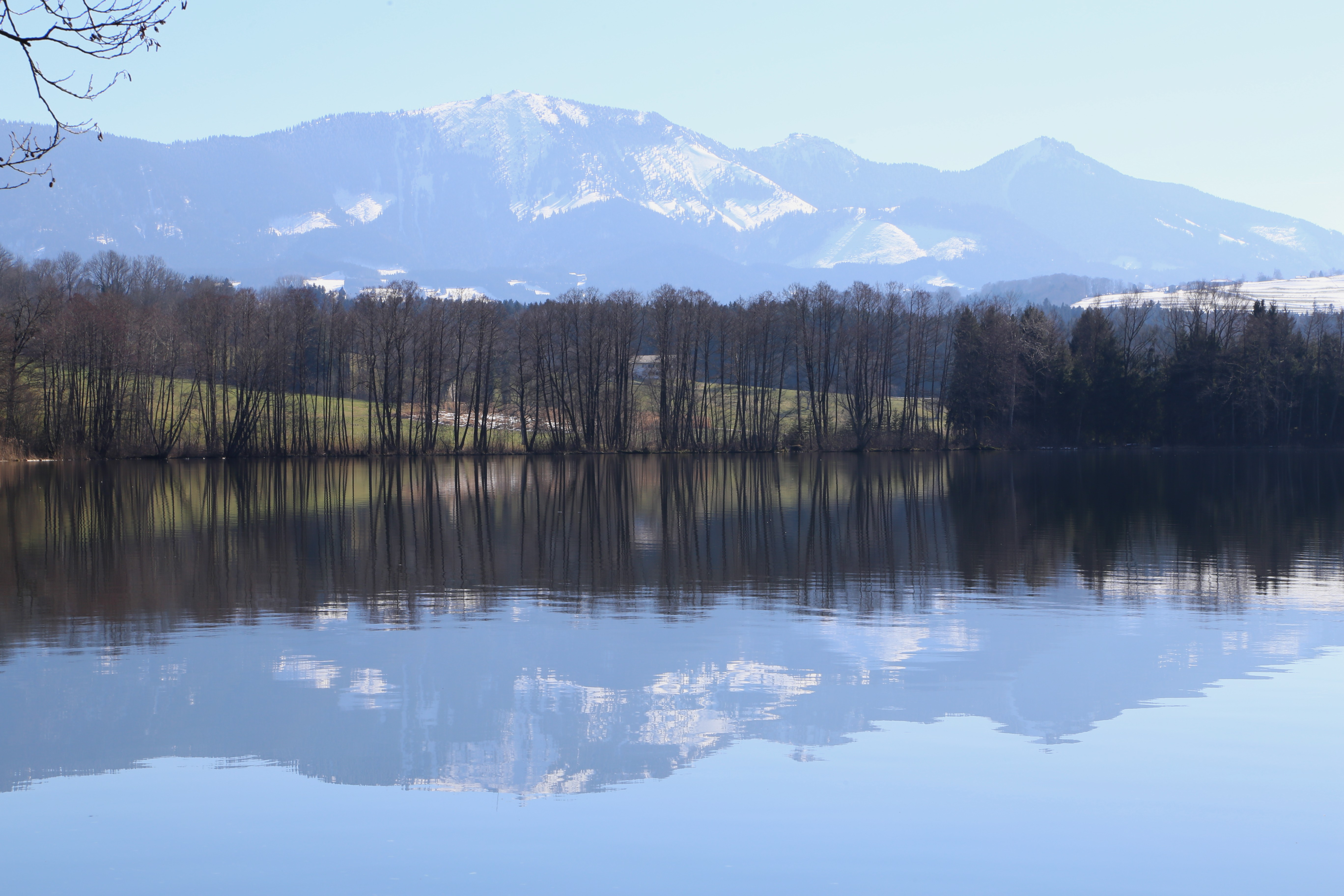 Tinninger See, Nordufer, im Hintergrund die Hochries